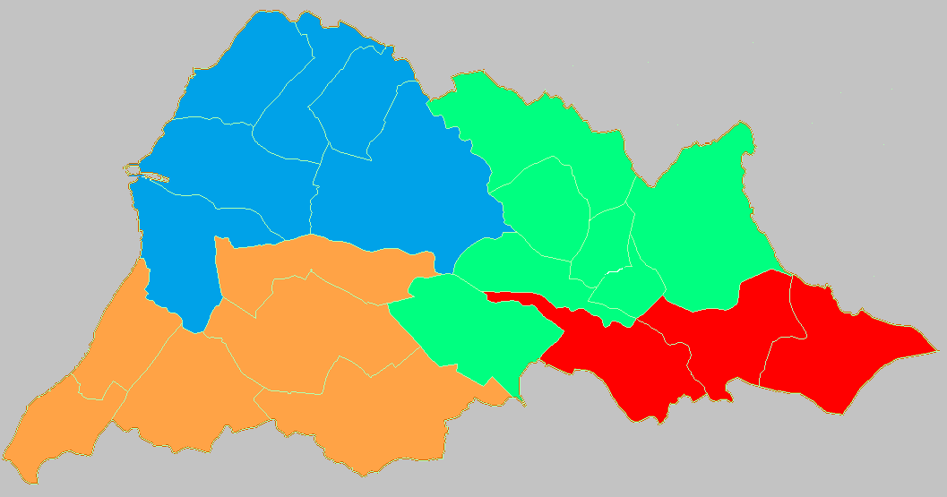 新屋鄉次分區圖。